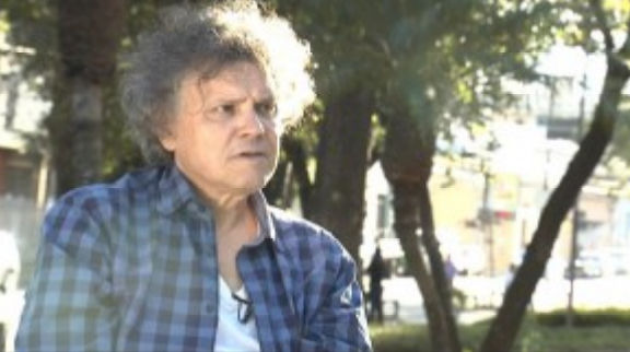 O músico brasileiro Arrigo Barnabé